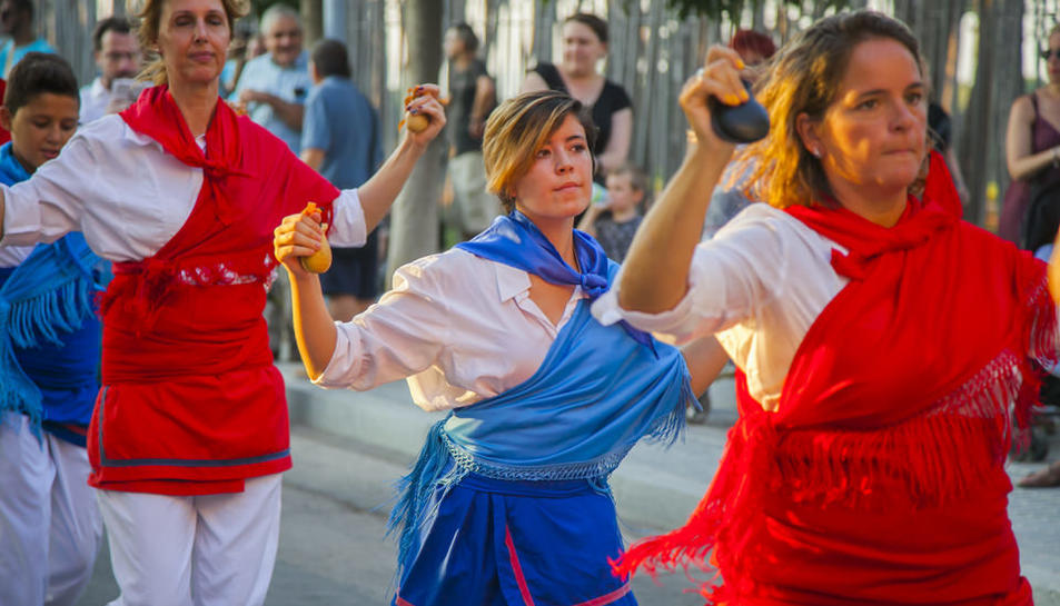 Ball de Valencians de Vila-seca